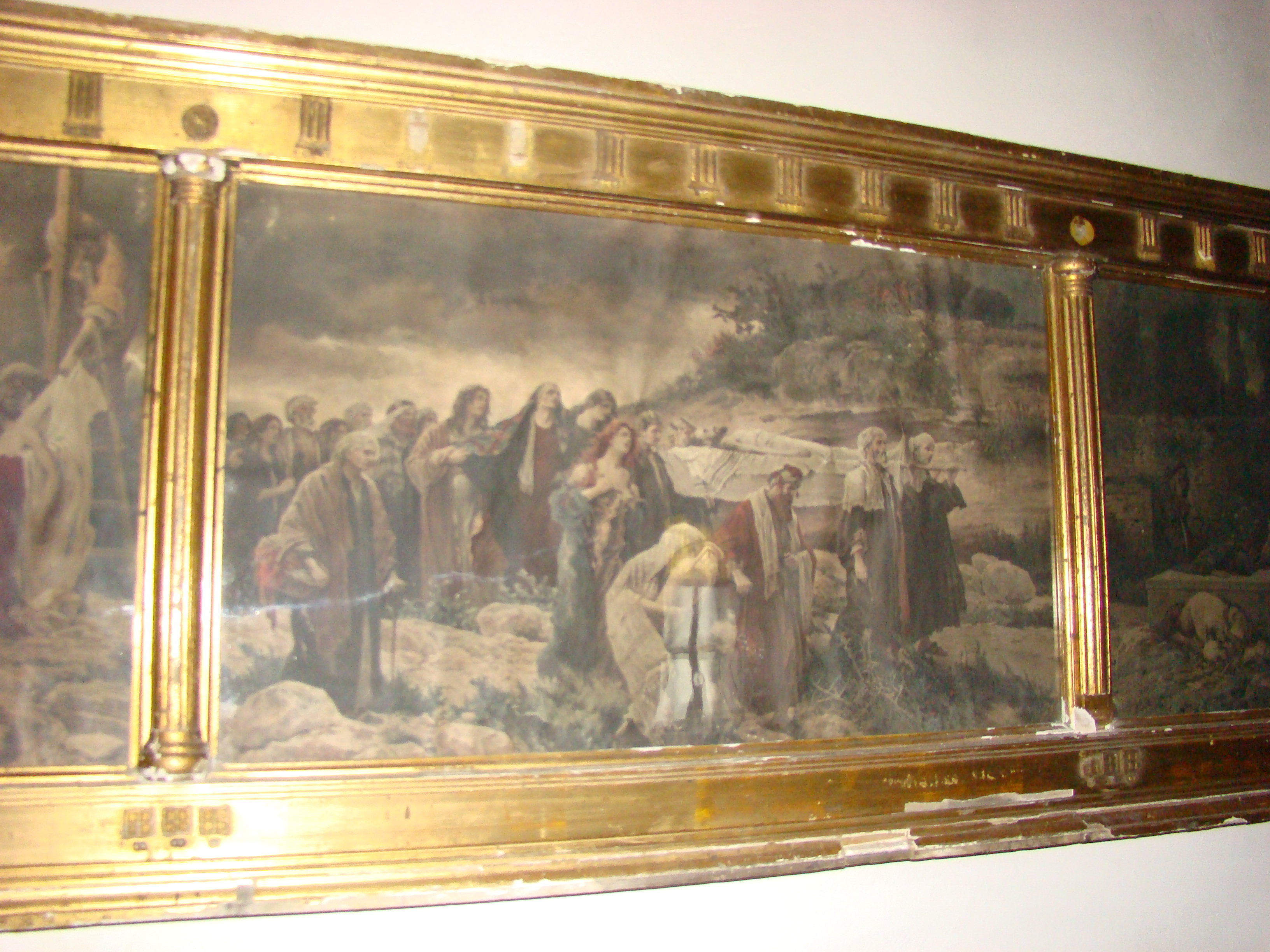 Biserica "Cuvioasa Paraschiva", sat LĂPUŞNIC; comuna DOBRA